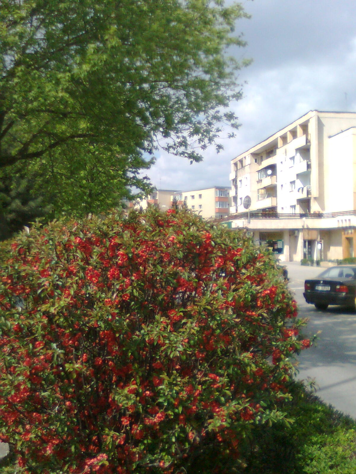 Kolozsvár Pasteur utca vége